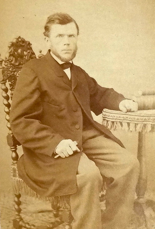 Portrait de Valentin Leisenheimer (1811-1891). Image clippée.